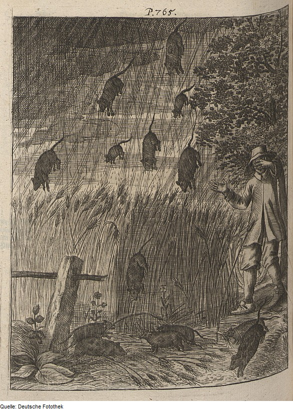 Original image description from the Deutsche Fotothek Mythologie & Märchen